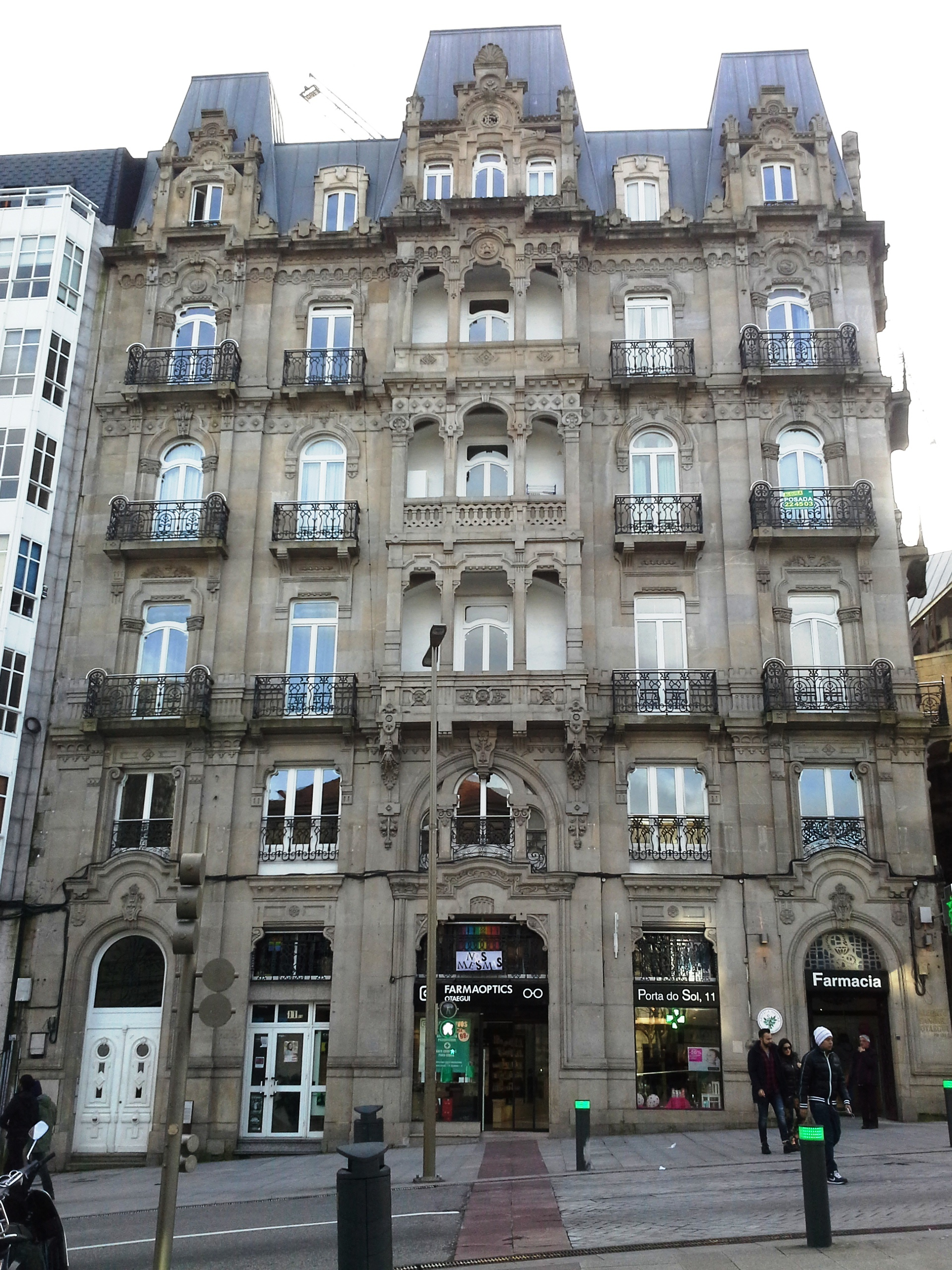 Vexa o título e as categorías